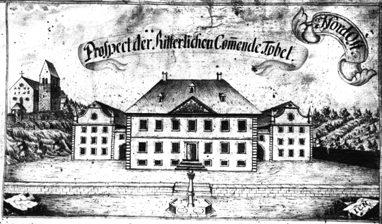 Ansicht des Neubaus der Komturei Tobel im Thurgau, Schweiz, nach 1747.